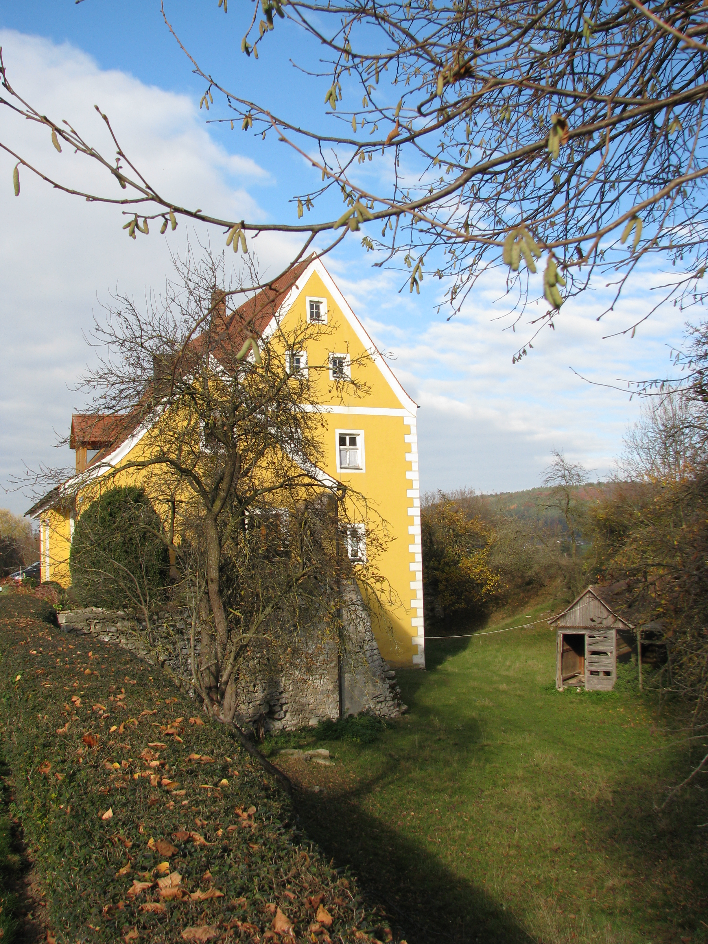 Jettenhofen, Ortsteil von Freystadt im Landkreis Neumarkt in der Oberpfalz, Wohnbau des ehemaligen Schlosses